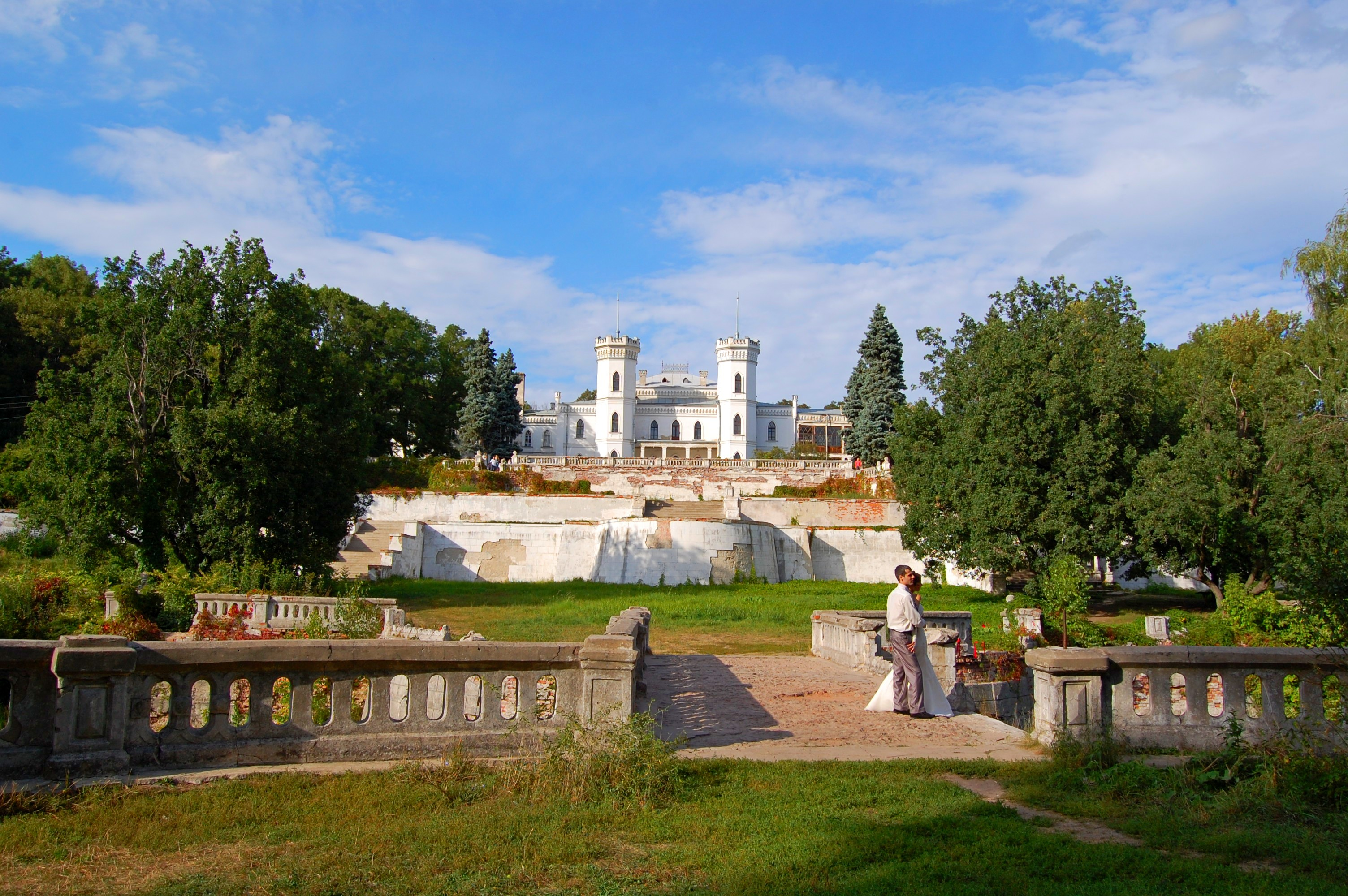 Палацо-парковий ансамбль, смт.Шарiвка